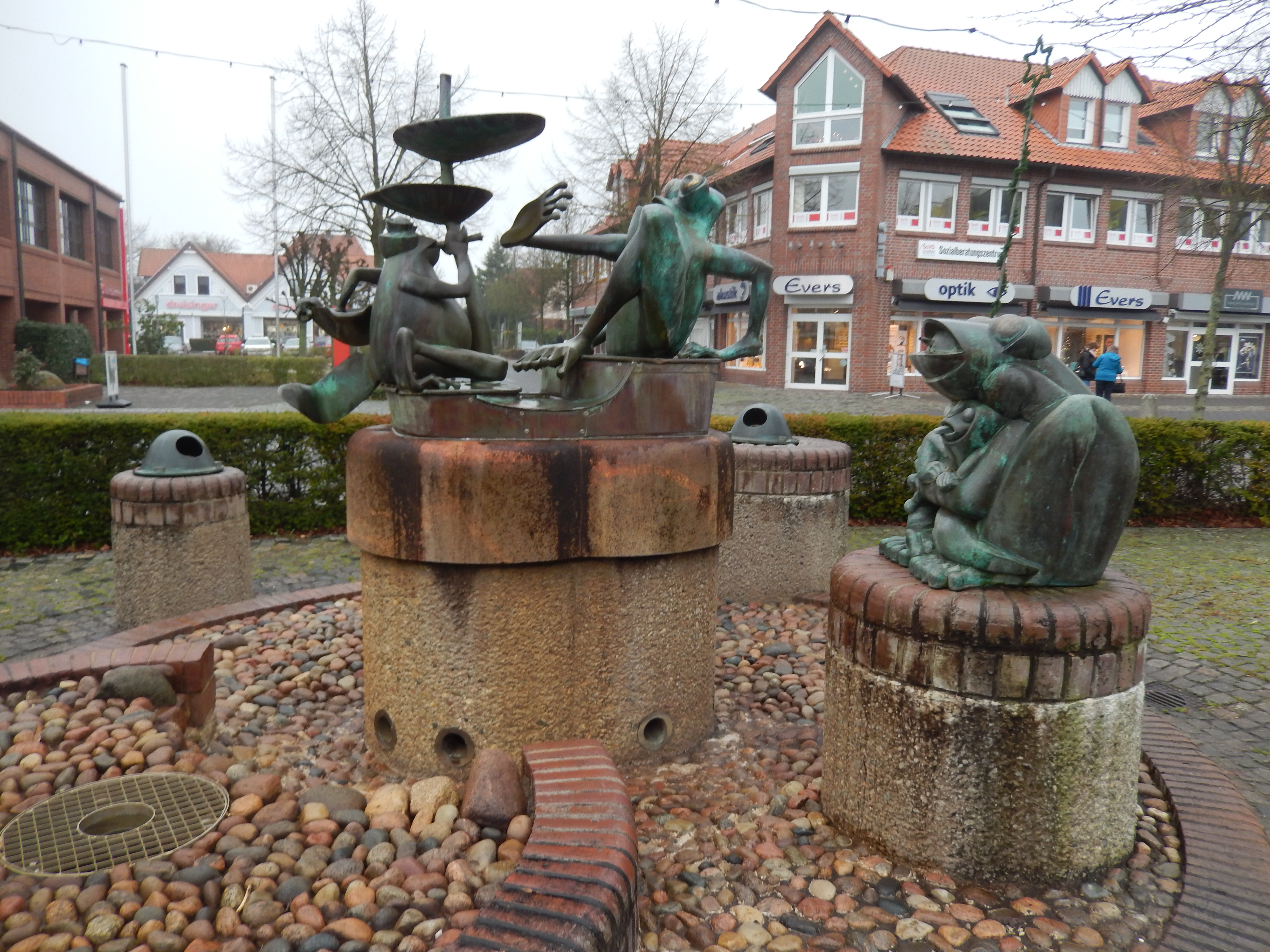 Froschbrunnen von Robert Enders in Sulingen